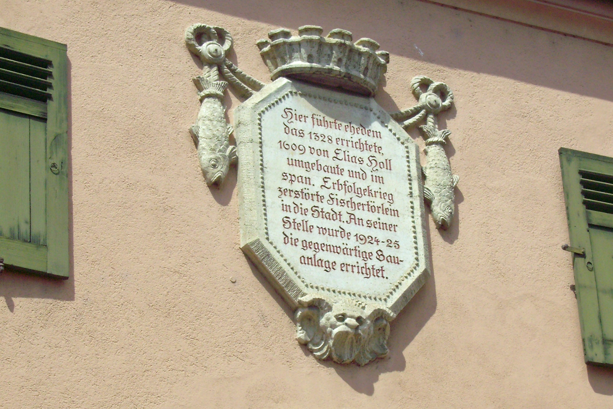 Inschrift am Augsburger Fischertor